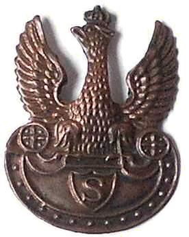 Orzełek Związku Strzeleckiego "Strzelec"